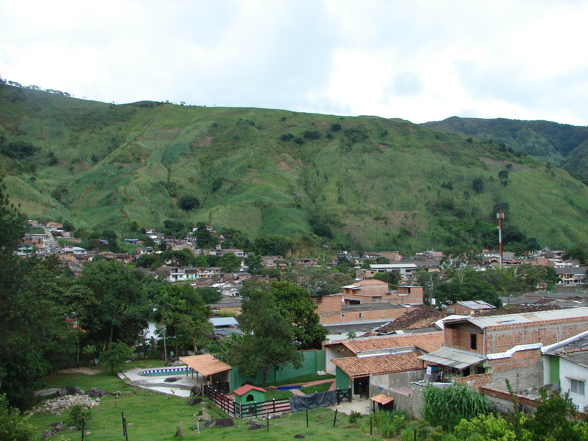 Panorámica del Municipio de Cisneros, Antioquia, Colombia.CISNEROS - ANTIOQUIA